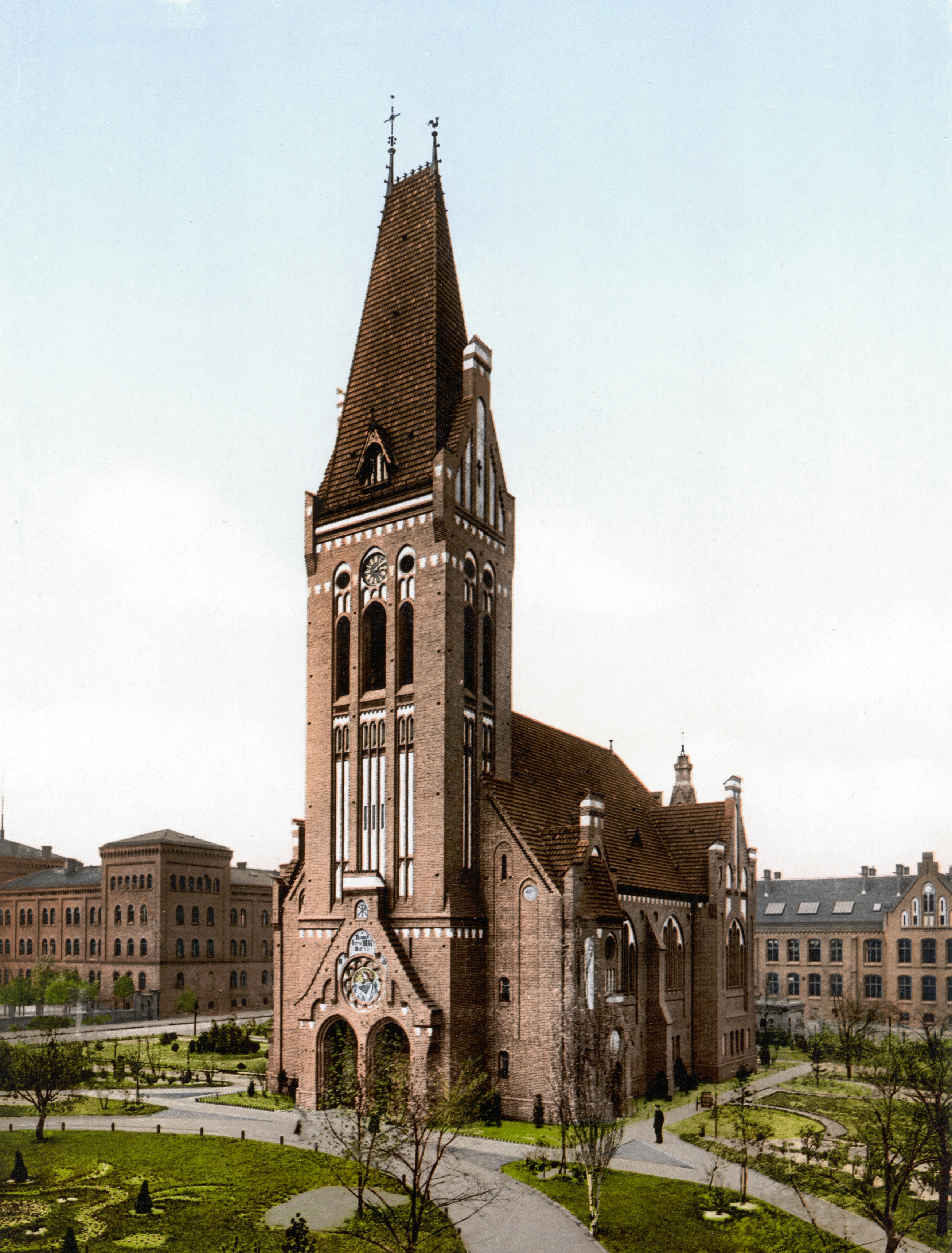 Bromberg, Christuskirche